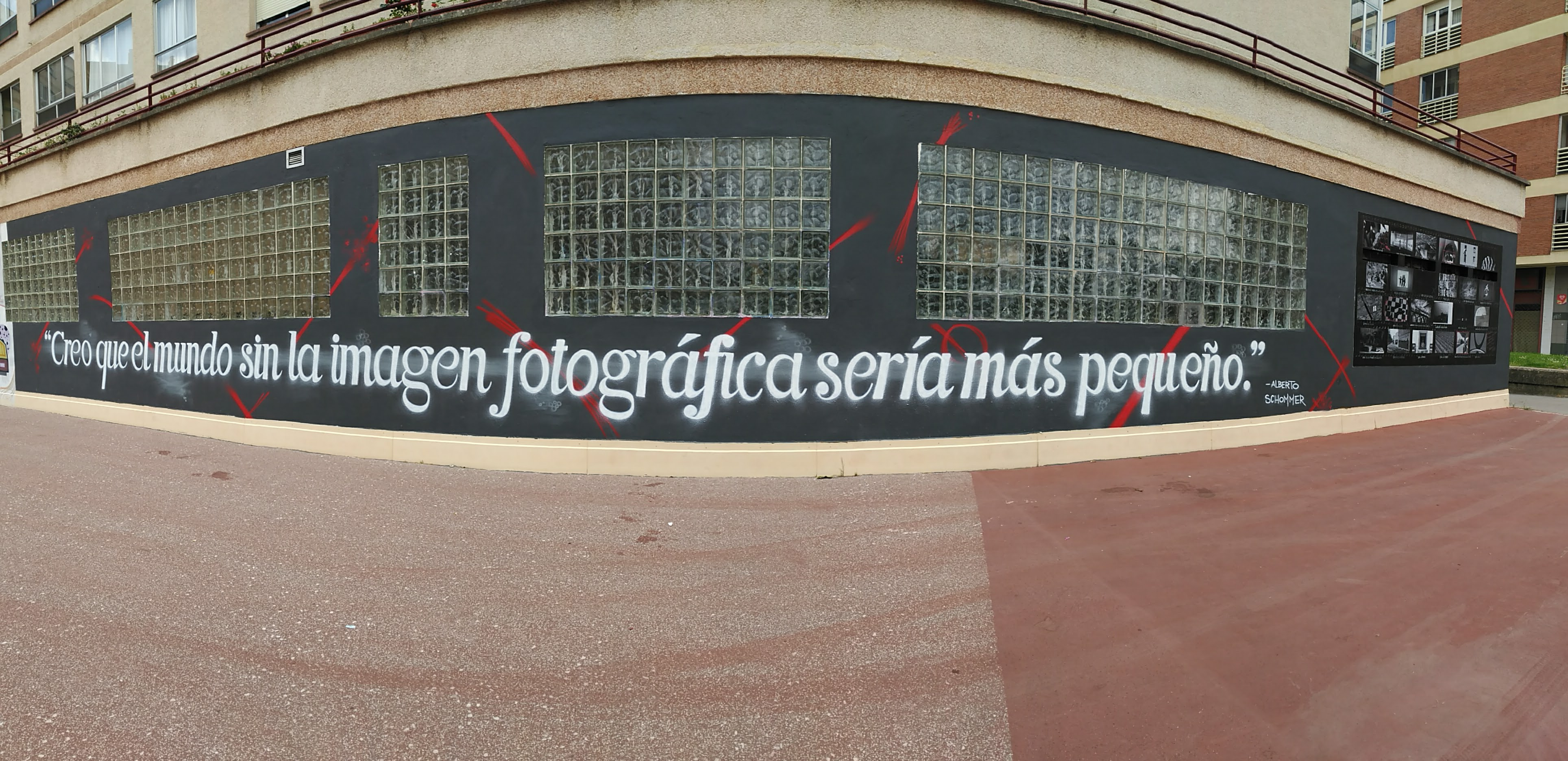 Iniciativa parte de la Sociedad Fotográfica Alavesa (SFA) trabajando de manera conjunta con el Itinerario Muralístico de Vitoria-Gasteiz.